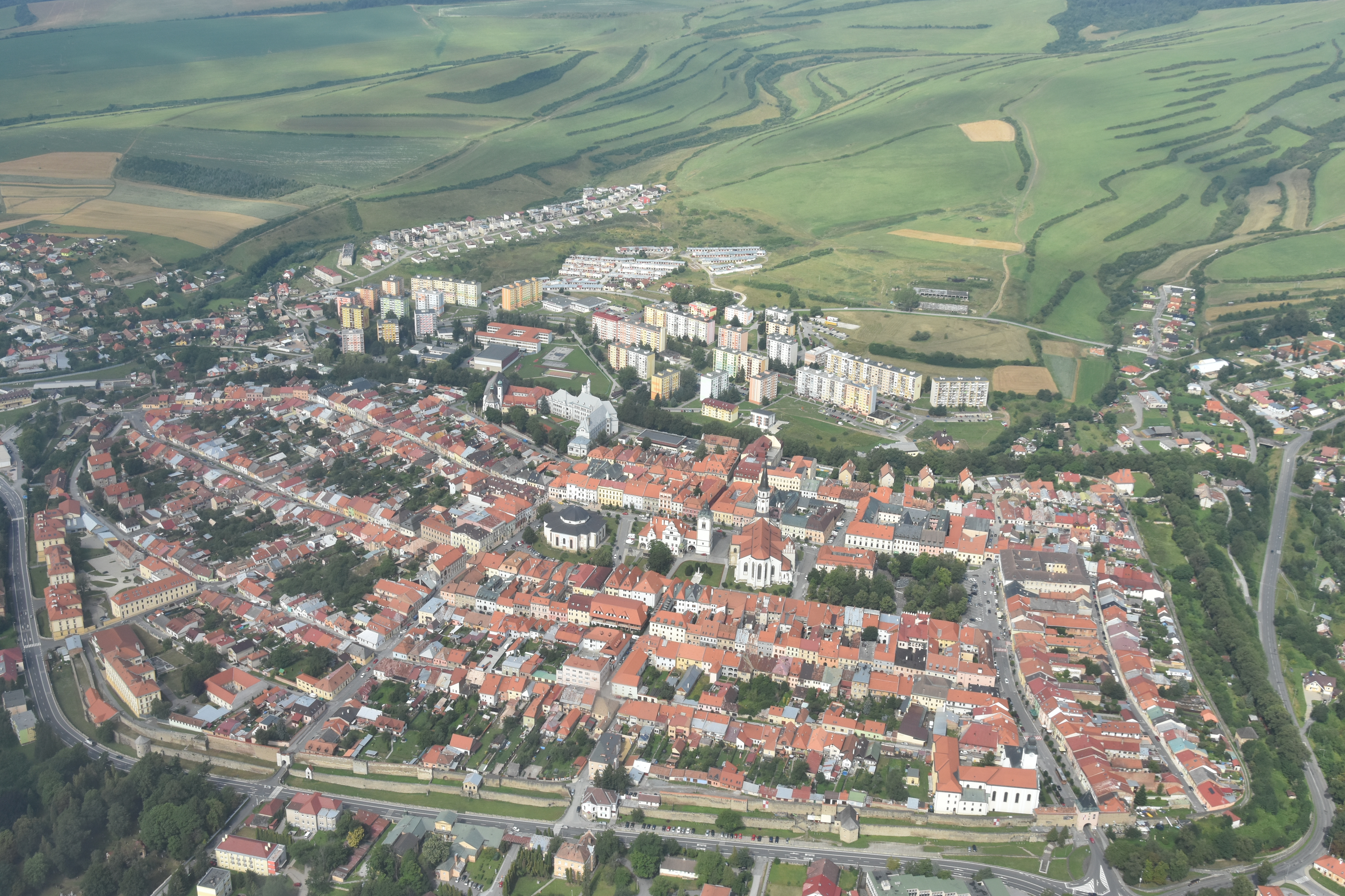 Luftbild von Levoca